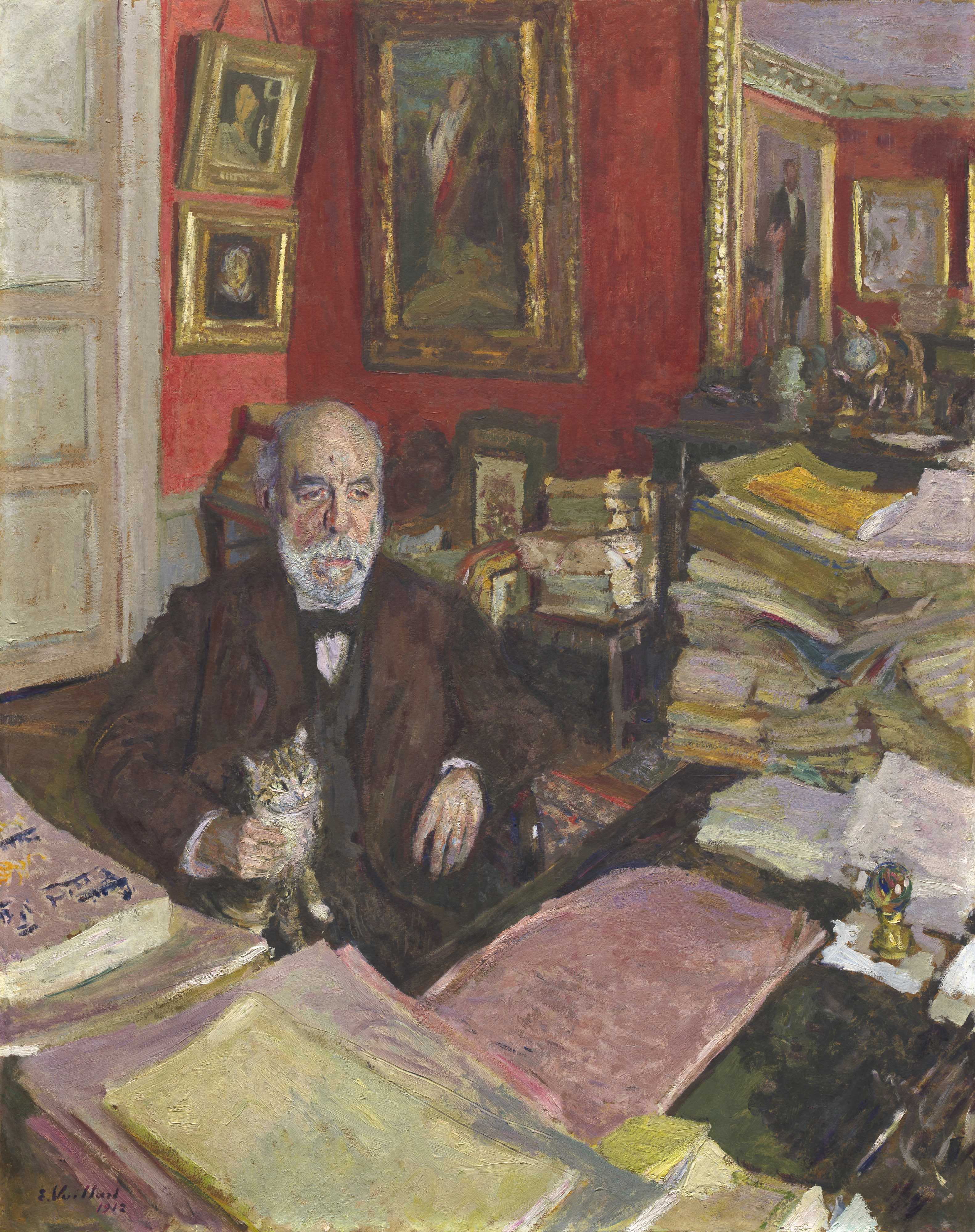 Théodore Duret 95x75 cm, huile sur carton